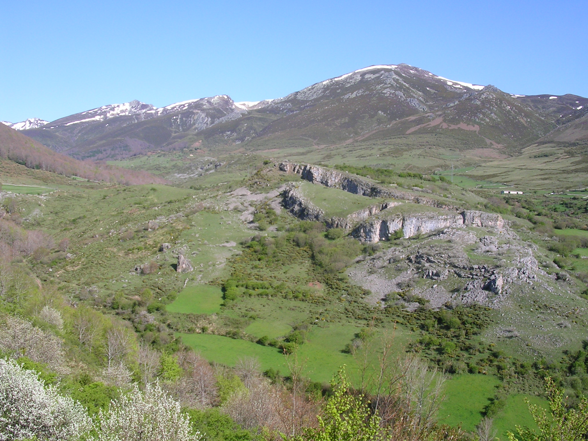 Asentamiento de la Edad del Hierro en la Hermandad de Campoo de Suso, Cantabria. Al fondo, la sierra del Cordel.